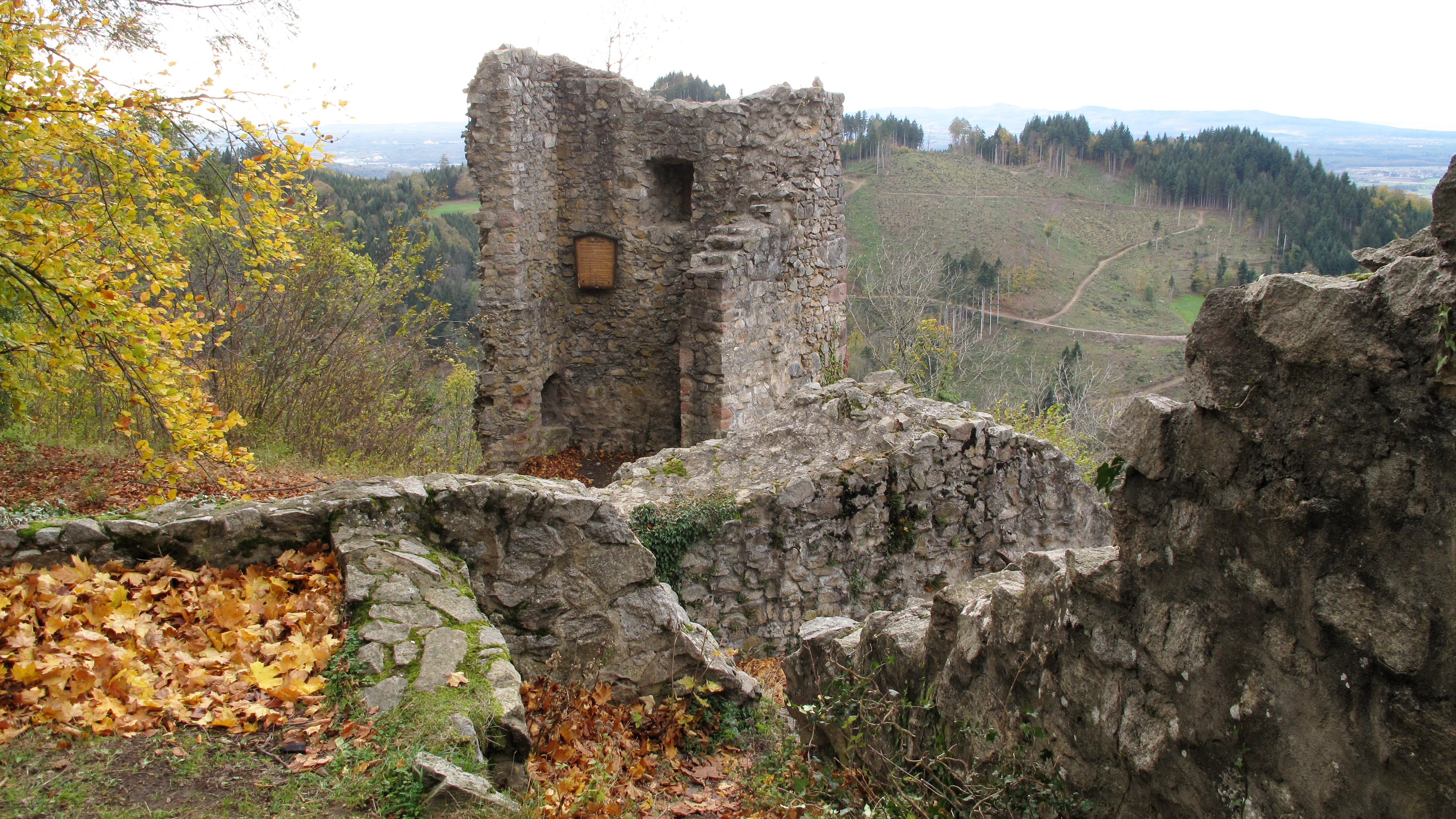 Nordwestliche Burgsspitze mit dem heutigen Wahrzeichen der Ruine, dem Schalenturm.